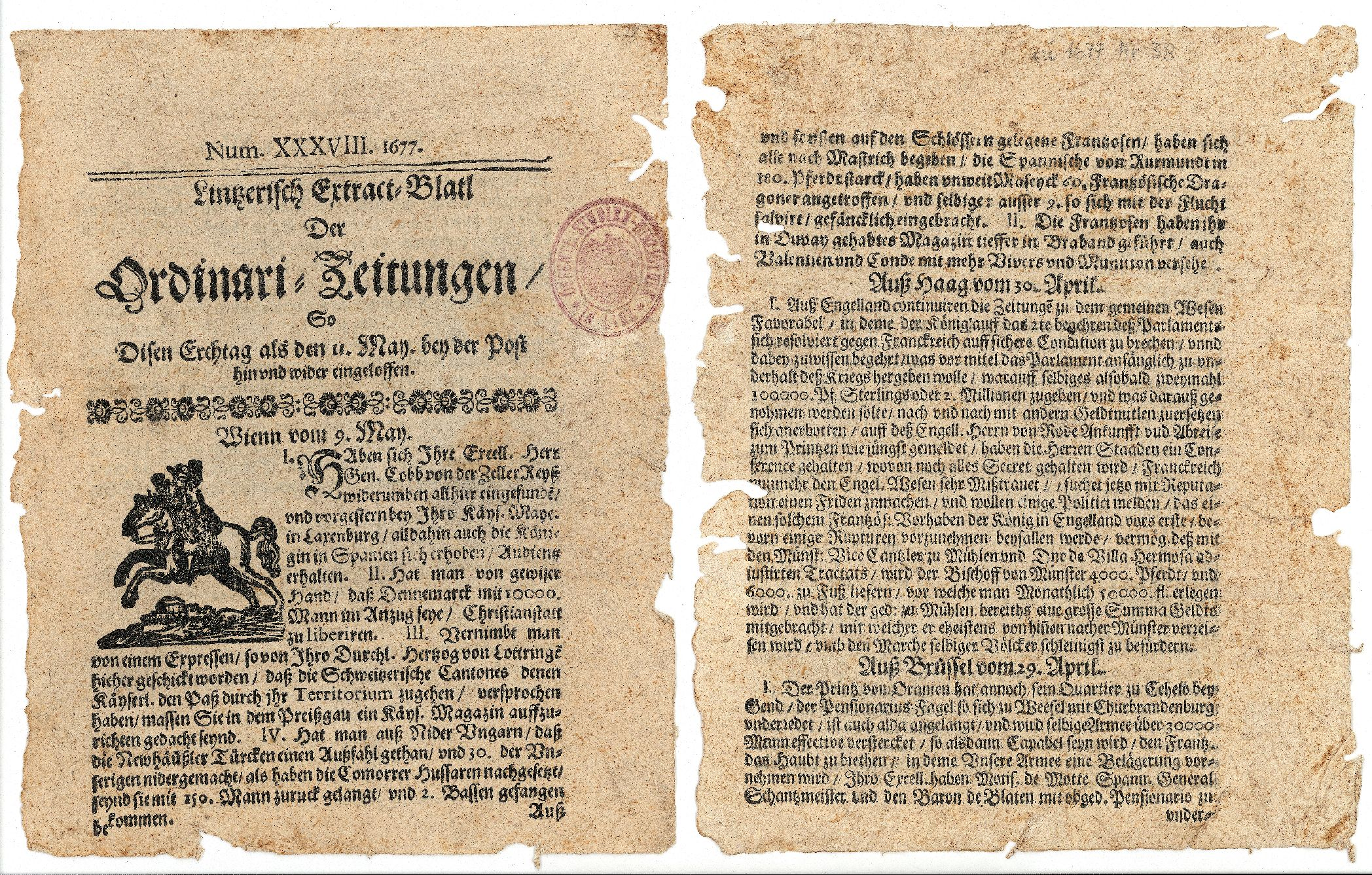 Ältestes Zeitungsfragemnt in der Oö. Landesbibliothek vom 16. Mai 1677